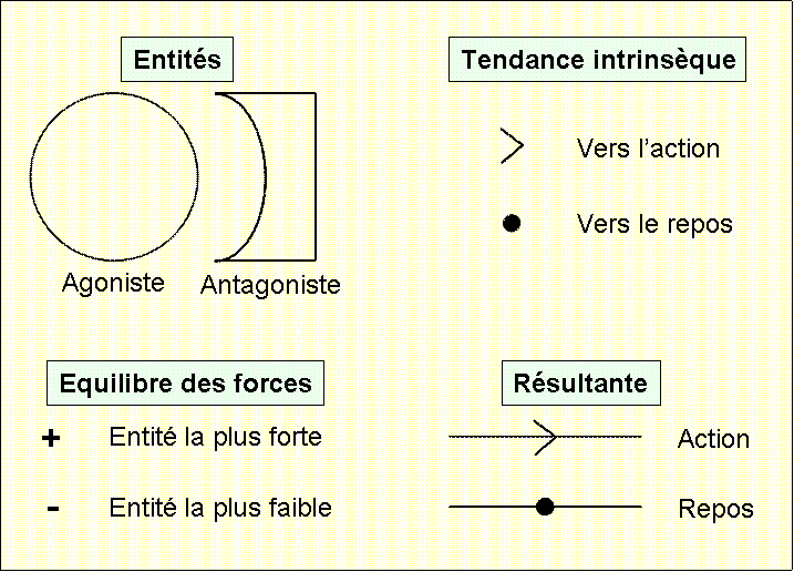 Symbolique de la Dynamique des forces, d'après Leonard Talmy